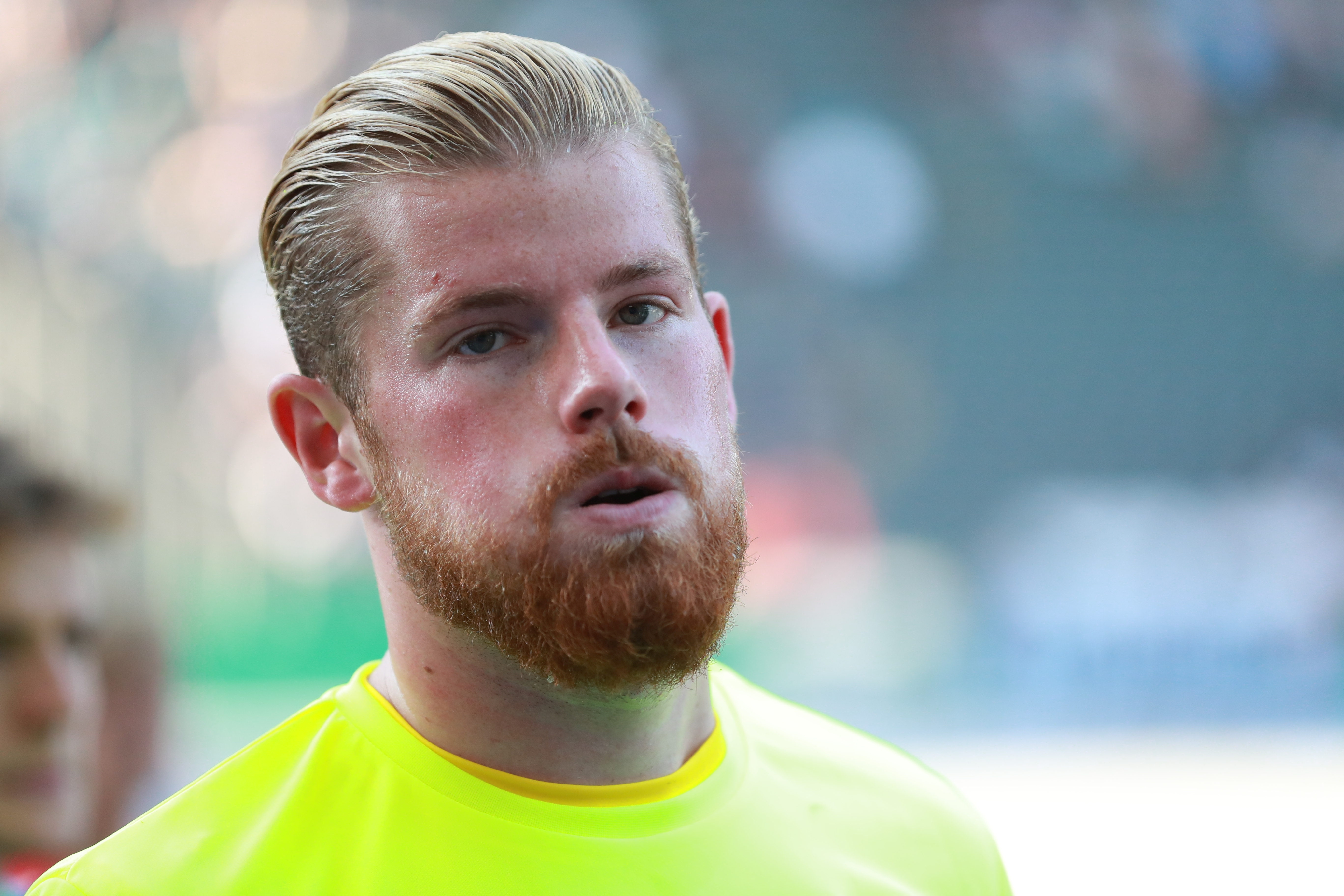 DFB-Pokal 2018/19, 1. Hauptrunde: BFC Dynamo gegen 1. FC Köln 1:9 (1:4)